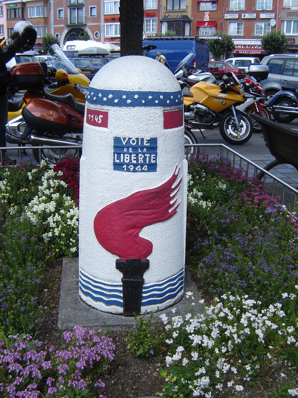 Voie de la Liberté 1944 BASTOGNE Place General McAuliffe